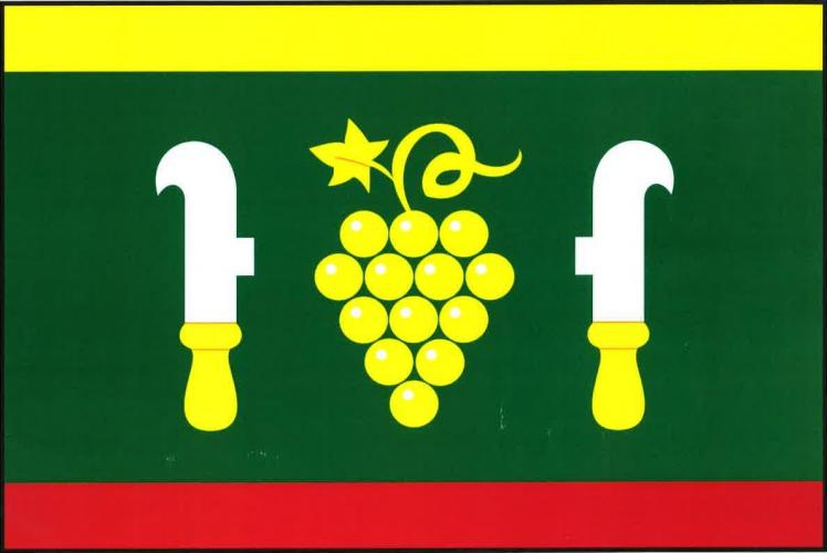 vlajka,Dyjákovičky , okres Znojmo